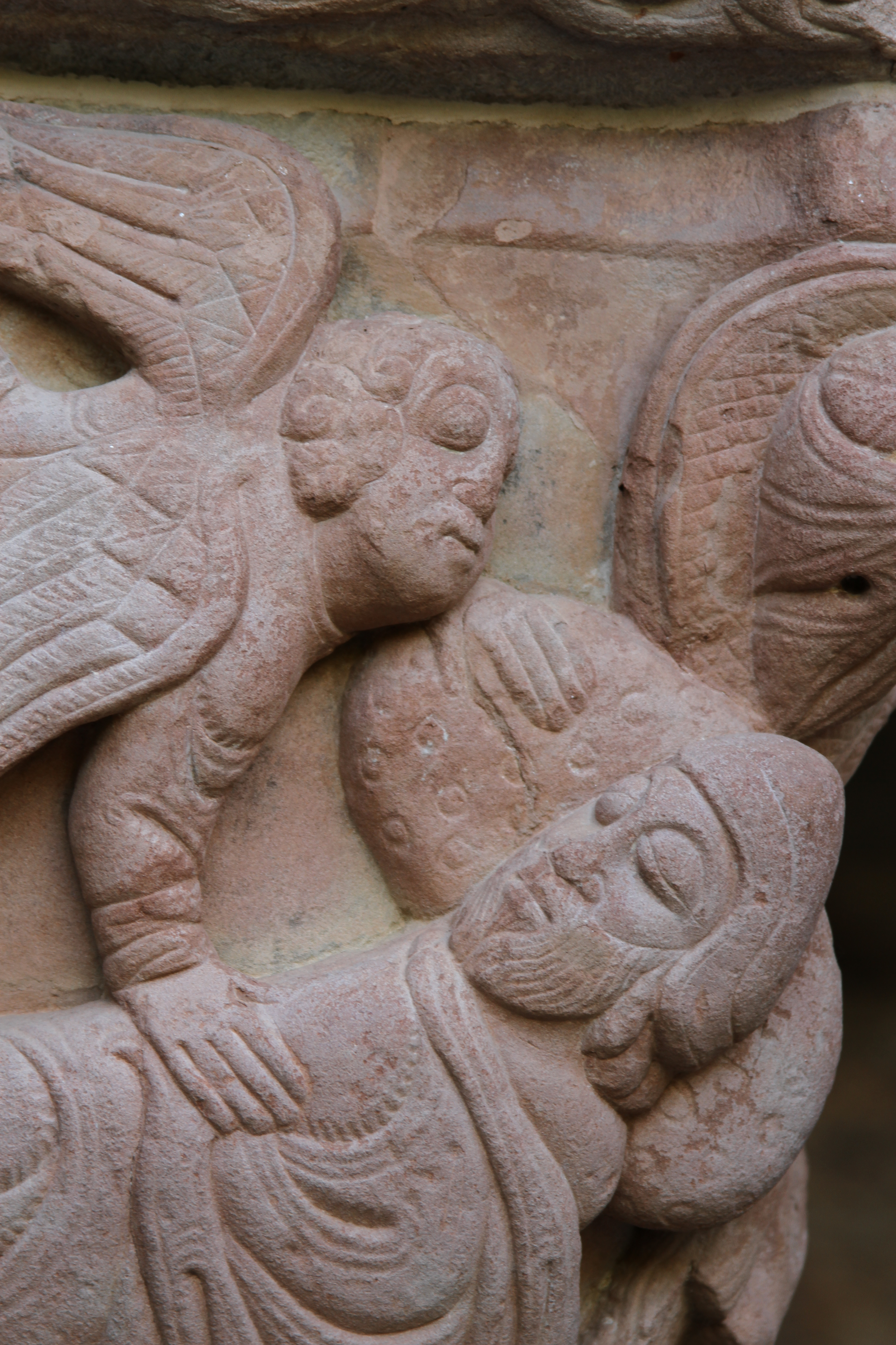 Monasterio Viejo de San Juan de la Peña, claustro, capitel románico, S. XII